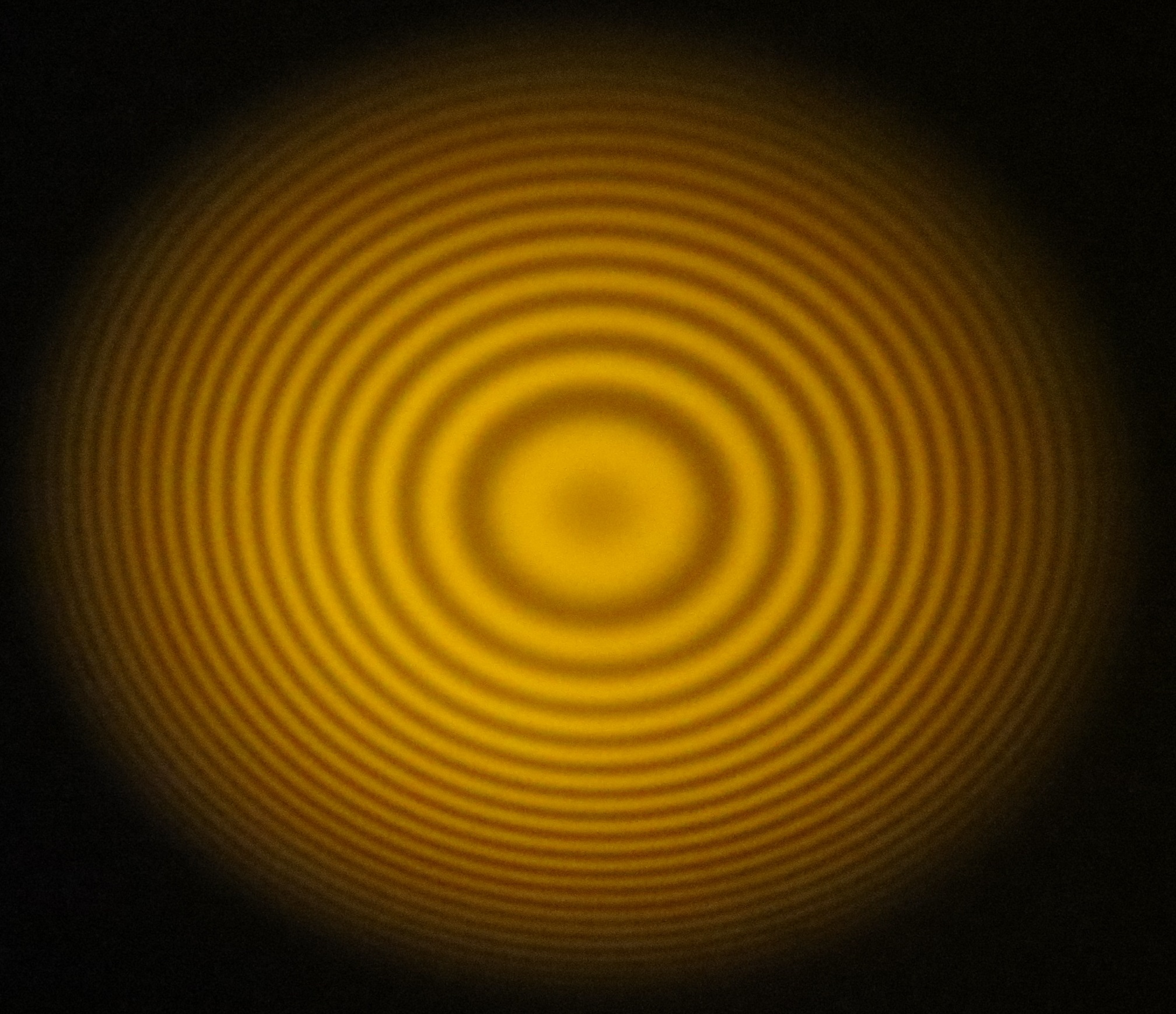 Interferenzmuster hinter Fabry-Pérot-Interferometer-Perot der Natrium-D-Linie